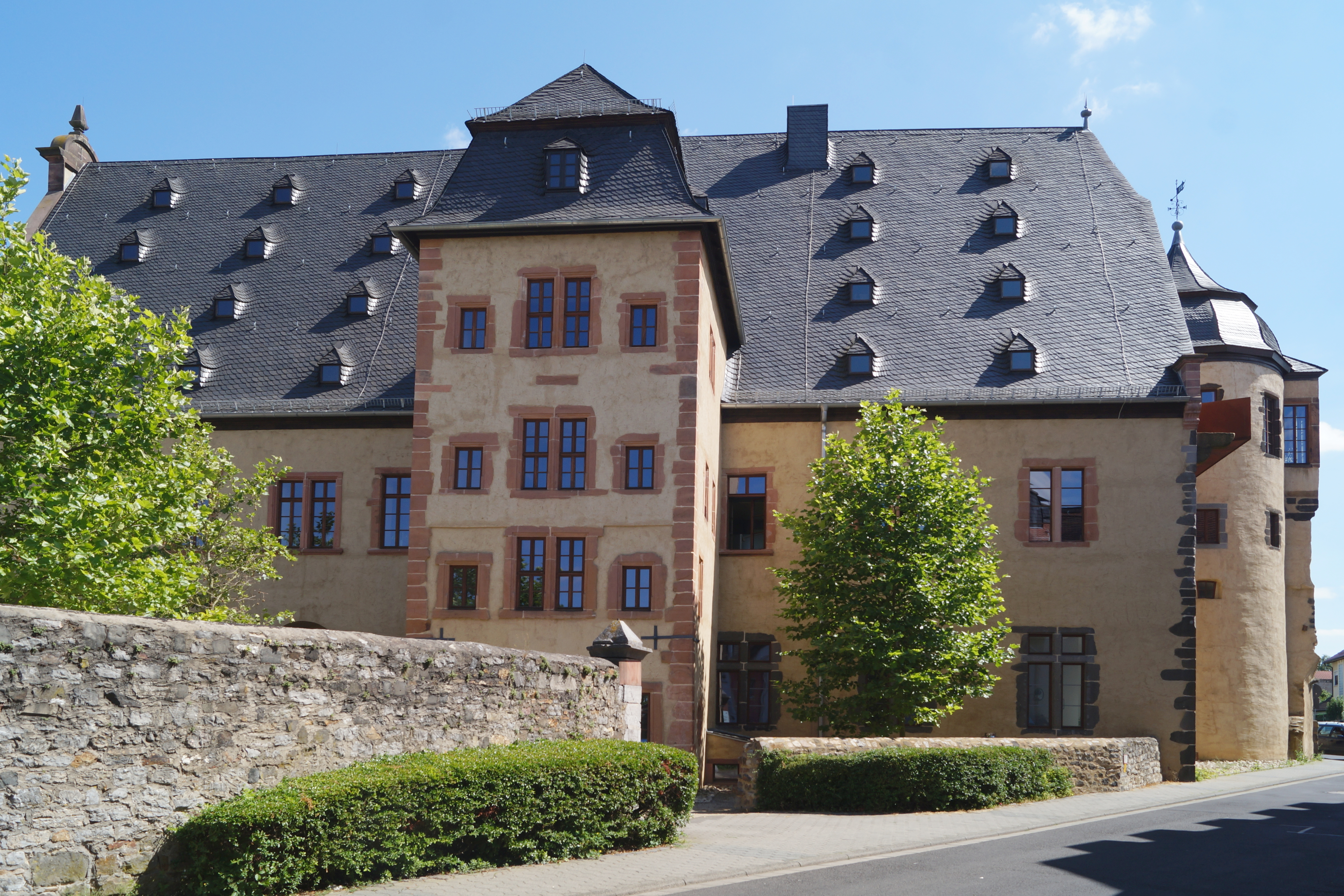 Ehemaliges Solmser Schloss in Butzbach, Hessen. Ansicht von NW. Blick auf den renaissancezeitlichen Eingangsrisalit mit Treppenhaus.